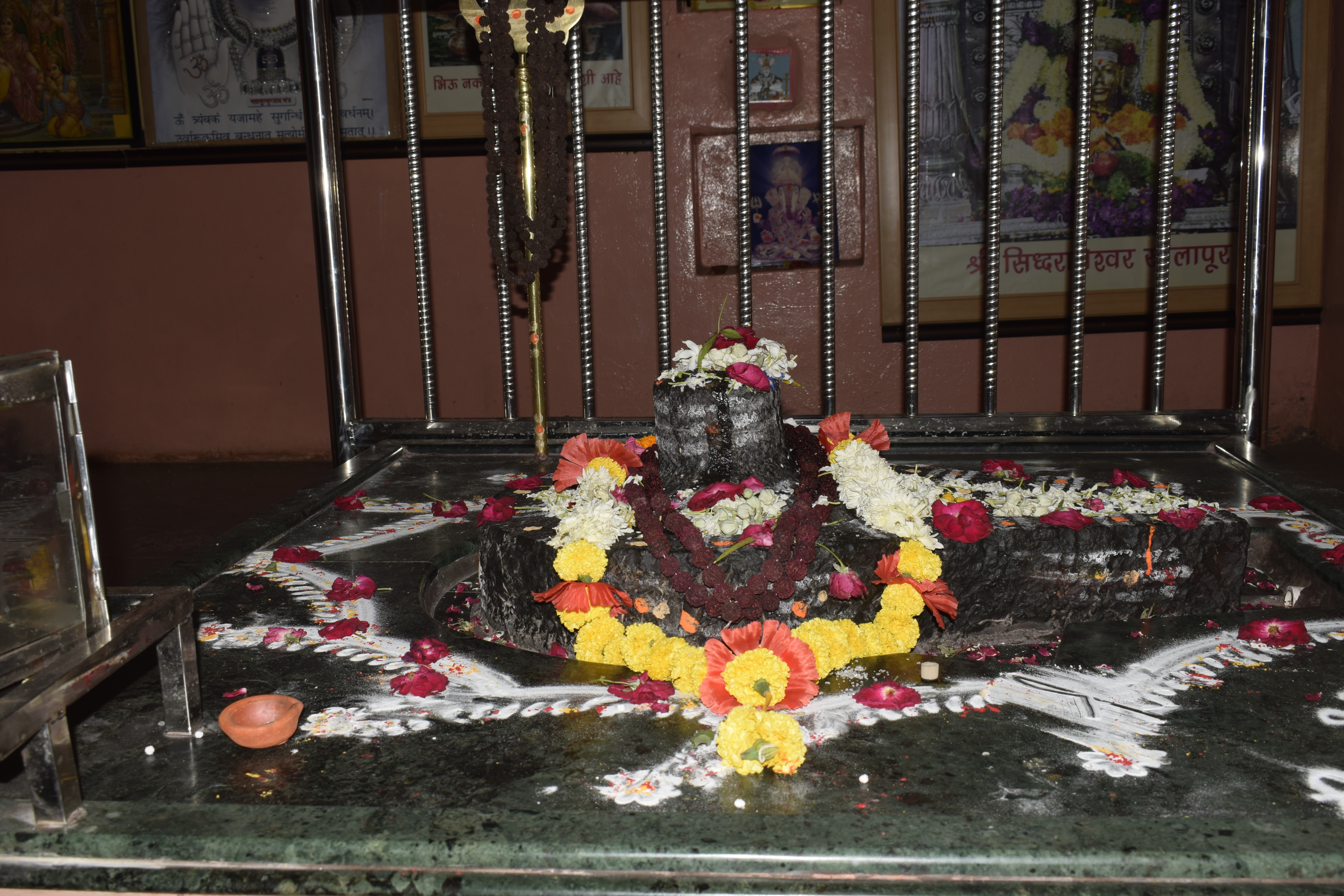 श्री आनंदेश्वर लिंग